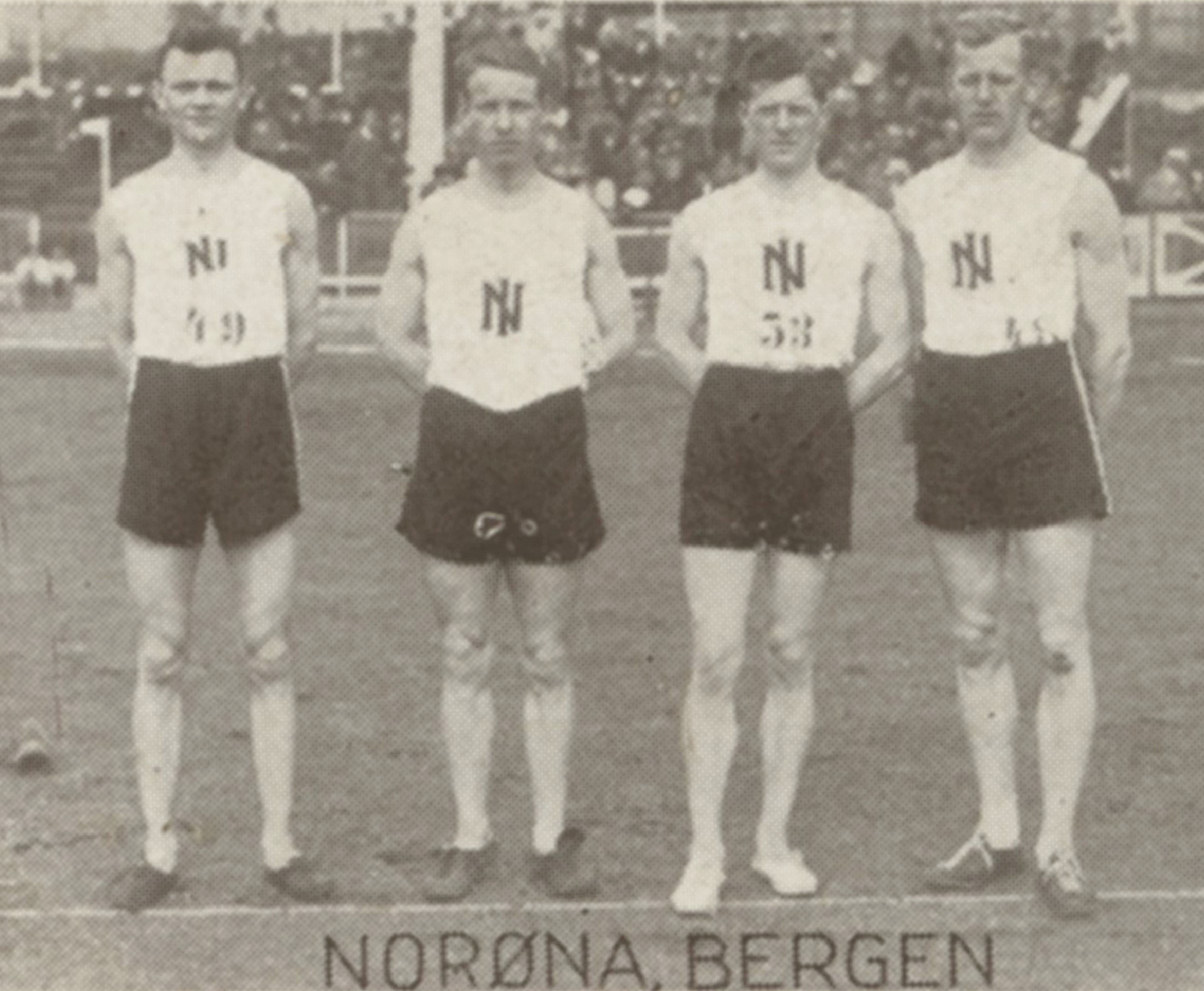 Format: Samlekort Dato / Date: ca. 1930 (dokumentet) Fotograf / Photographer: Ukjent Wikipedia: Idrettslaget Norrøna Wikipedia: Konrad Hauge (1903 - 1990) Eier / Owner Institution: Trondheim byarkiv, The Municipal Archives of Trondheim Arkivreferanse / Archive reference: Sportsklubben Freidig: Sigarettfoto ca. 1930 (Løpenr. 75) F23958 Tekst på baksiden: Norøna, Bergen, vant stafettmesterskapet 1928 over 4x100 meter, et av mesterskapets mest eftertraktede. Fra venstre Melvin Carson, Olav Stenseth, Per Mjåtvedt, Konrad Hauge. Merknad: Disse samlekortene med bilder av norske og internasjonale idretthelter fulgte med i sigarettpakker på 1920 og 30-tallet - derav tobakksreklamen på baksiden. Samlekortene kommer fra Sportsklubben Freidigs arkiv, og inneholder nærmere 90 unike kort pent plassert i et samlealbum. Samleren var den senere skipsmegler Finn Følling (1914 – 1985).